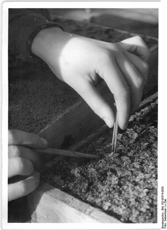 Pikieren von Sämlingen Aufn.: Illus Siebenhaar 1 Gloxinien werden pikiert. UBz: Das Pikieren mit der Pinzette.